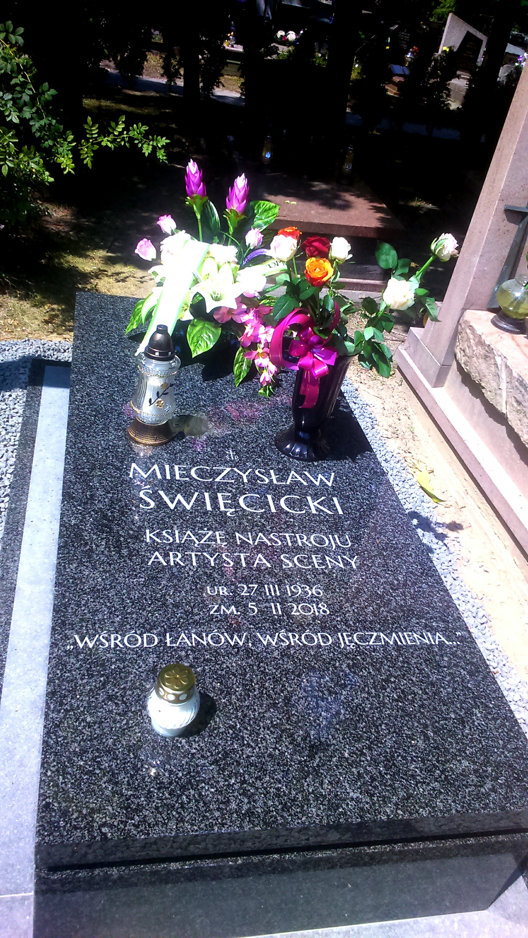 Nagrobek Mieczysława Święcickiego w Alei Zasłużonych na Cmentarzu Rakowickim w Krakowie.